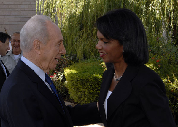 Shimon Peres and Condoleezza Rice.